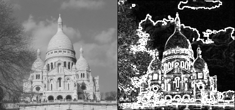 fr image filtree Sobel, détection de contour